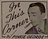 Gypsy Joe et sa femme en p.4 du magazine World's Light-HeavyWeight Champion des années 1940